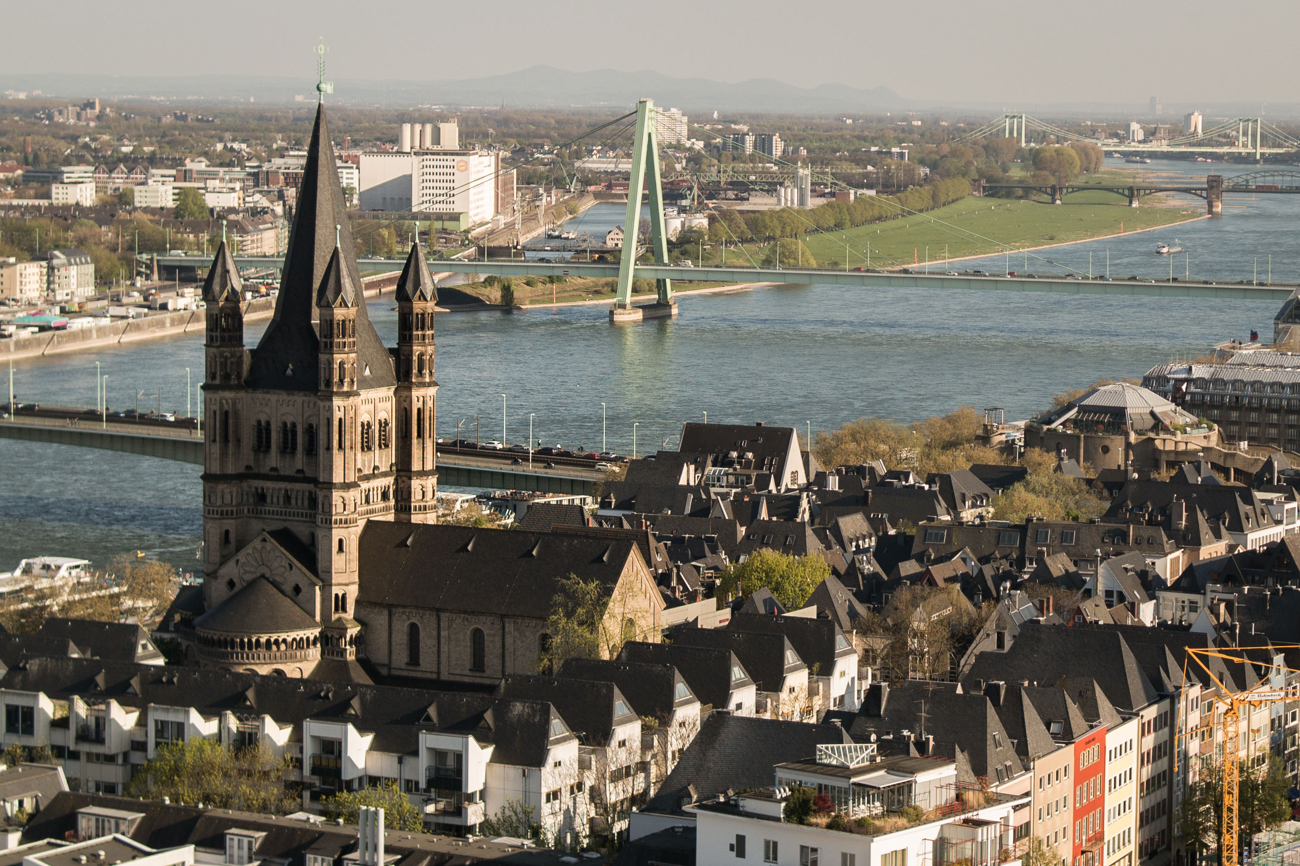 Kirche Groß St. Martin, Abgelichtet im Frühling 2015 vom Dach des Kölner Domes aus